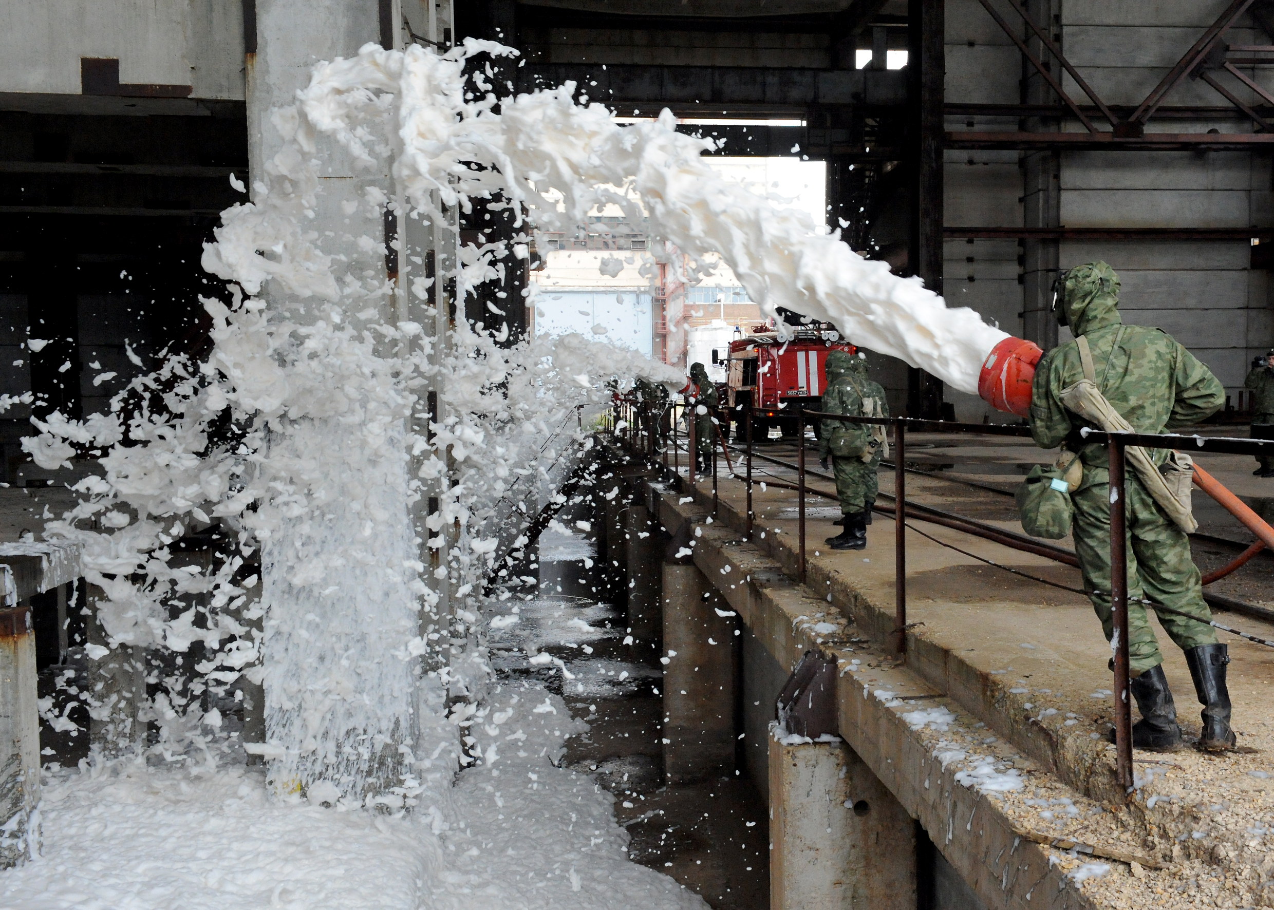 Maneuvers on Balakovo NPP